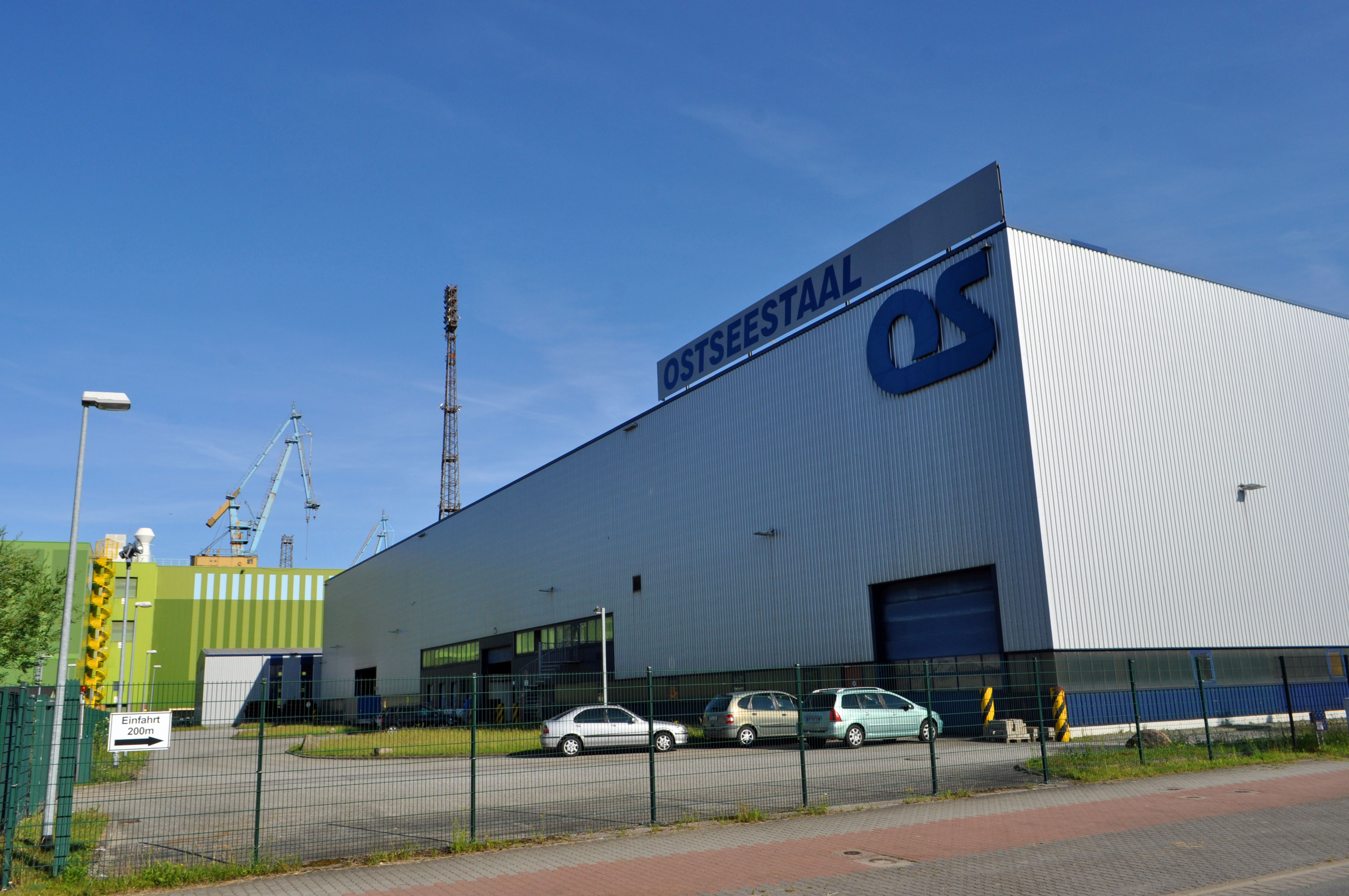 Stralsund, Ostseestaal GmbH, Halle, links Werfthalle